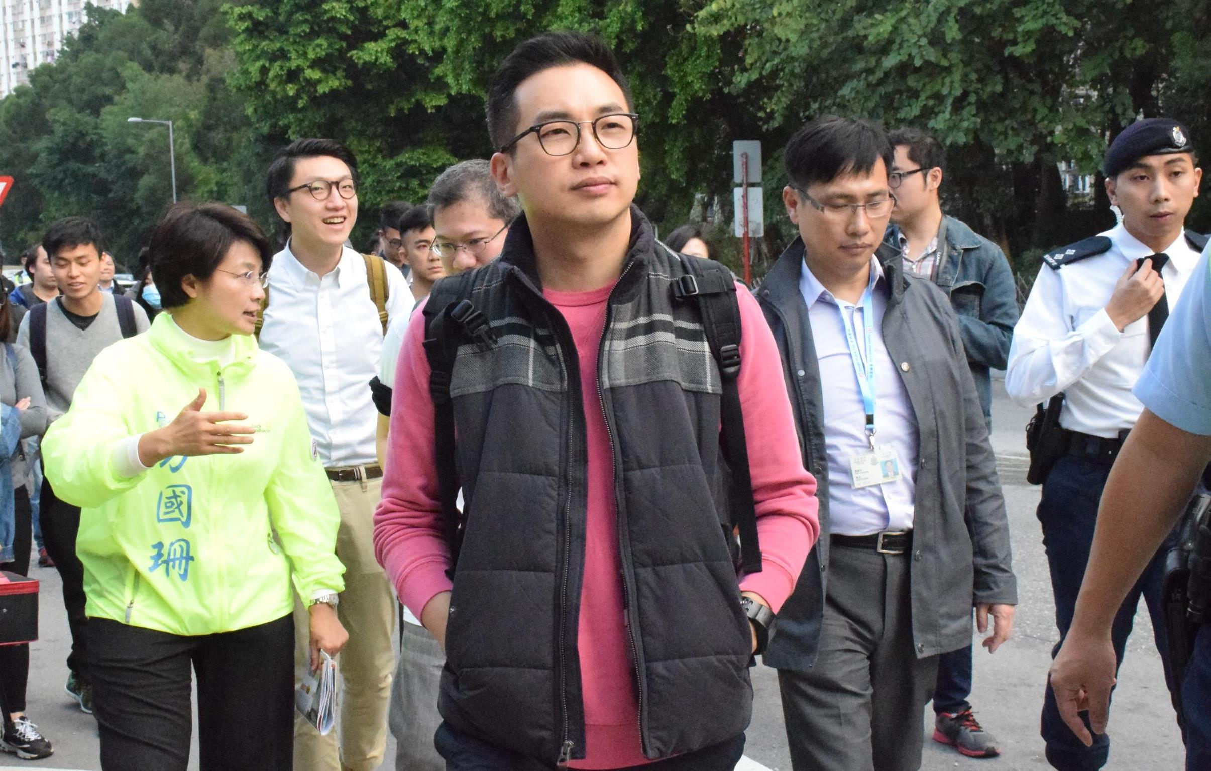 代表泛民主派的公民黨新界東立法會補選候選人楊岳橋 (攝影: 美國之音湯惠芸)